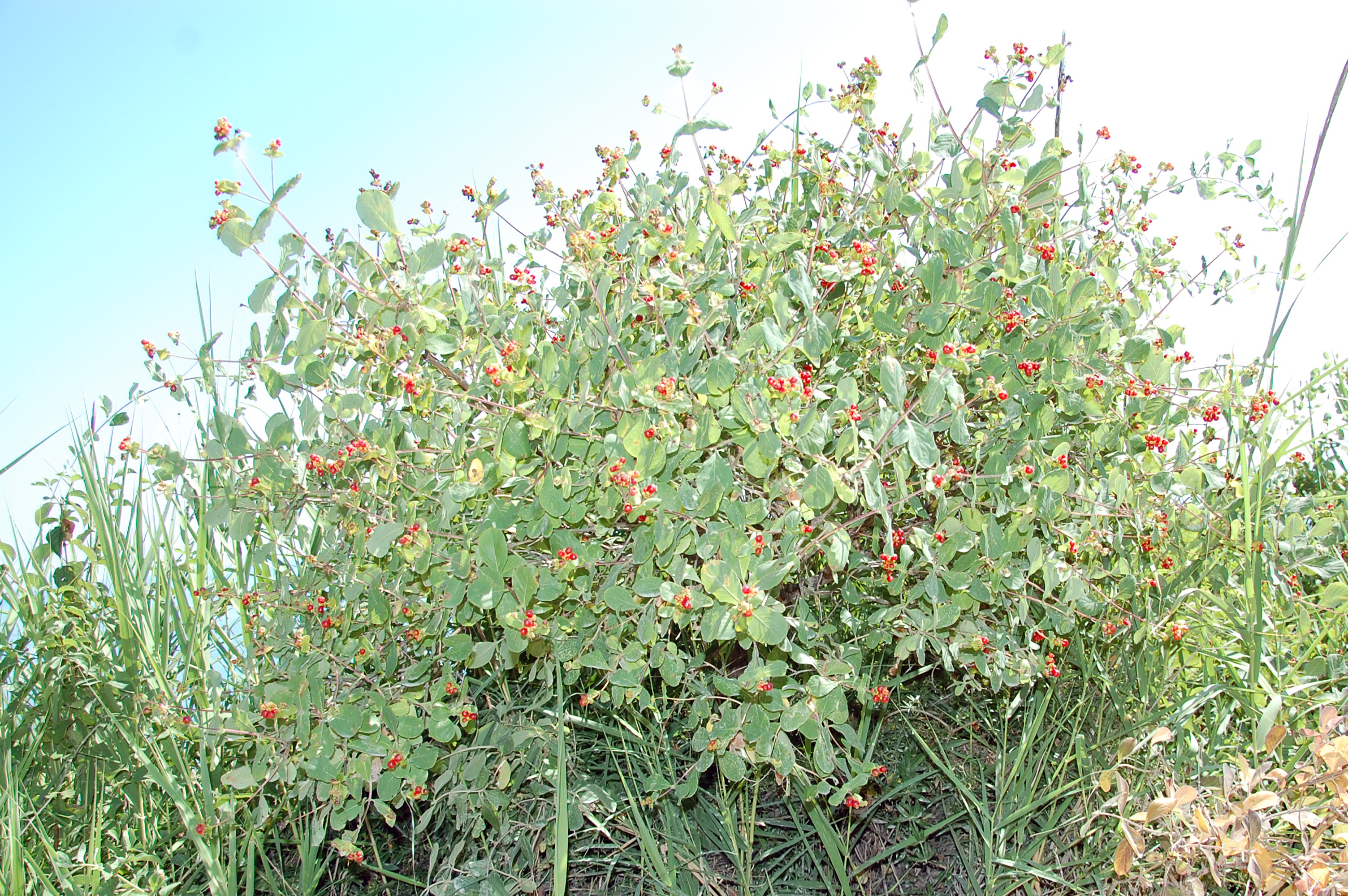 Lonicera etrusca Monte Conero, Italy